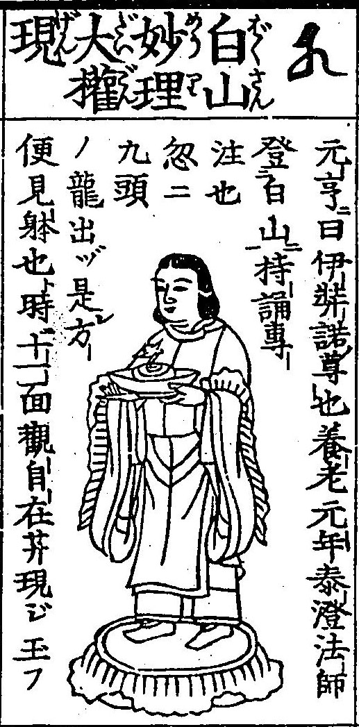 白山妙理大権現 元亨ニ曰伊弉諾ノ尊也 養老元年泰澄法師登白山持誦専注也 忽ニ九頭ノ龍出ヅ是方便見躰也ト 時ニ十一面観自在菩薩現ジ玉フ